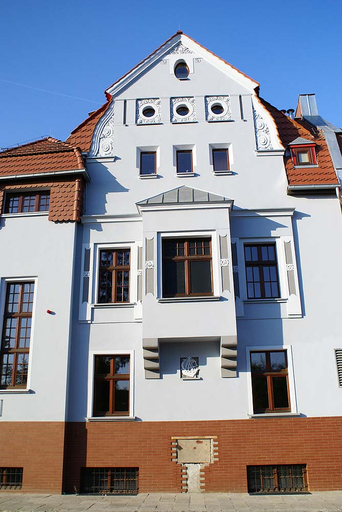 Dawny klub wioślarski wraz z przyległym terenem Na Grobli 30 i 32, Miasto Wrocław - Krzyki